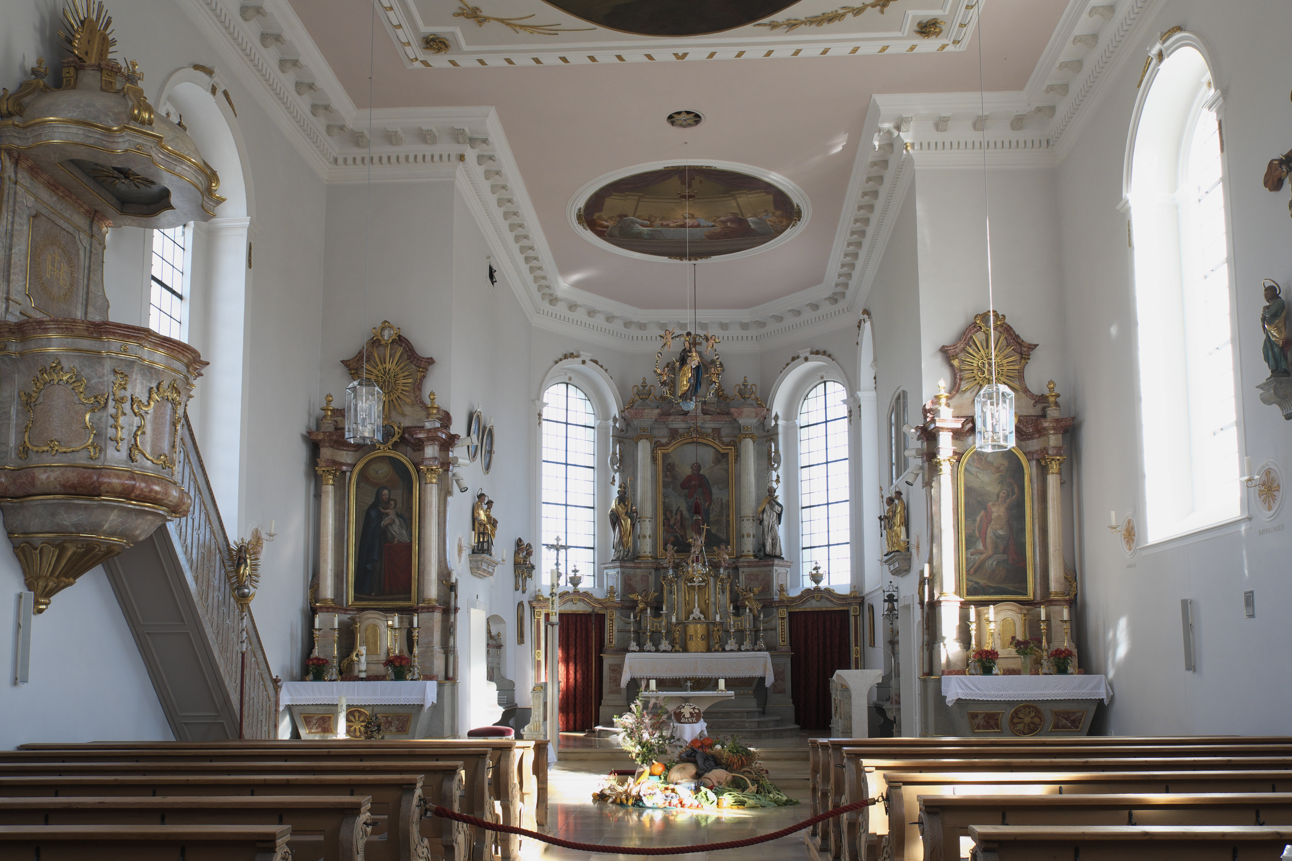 Katholische Pfarrkirche St. Bartholomäus in Epfach (Denklingen) im Landkreis Landsberg am Lech (Bayern/Deutschland), Innenraum